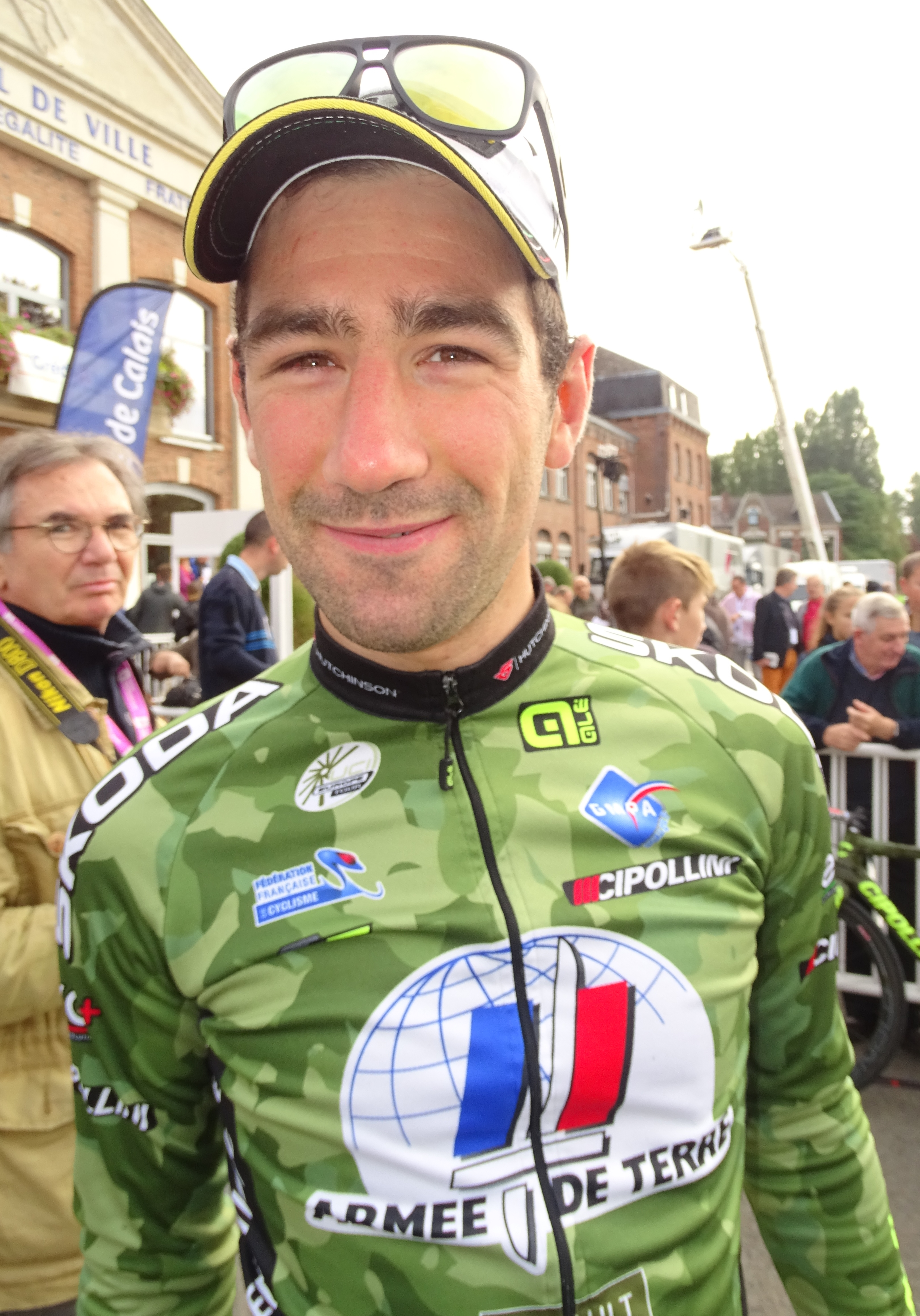 Reportage réalisé le dimanche 6 septembre à l'occasion du départ et de l'arrivée du Grand Prix de Fourmies 2015 à Fourmies, Nord-Pas-de-Calais, France.